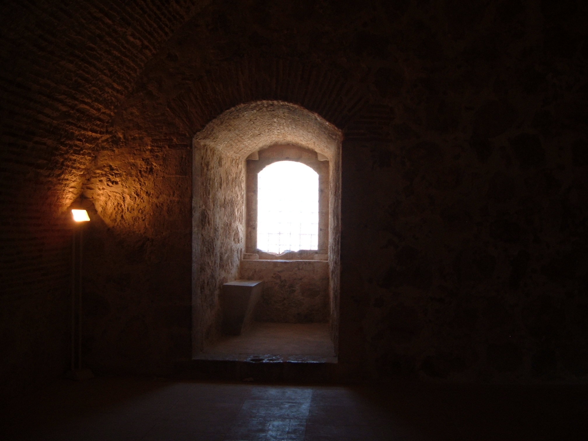 Interior del cuarto piso de la torre del homenaje del Castillo de la Atalaya, Villena, provincia de Alicante.